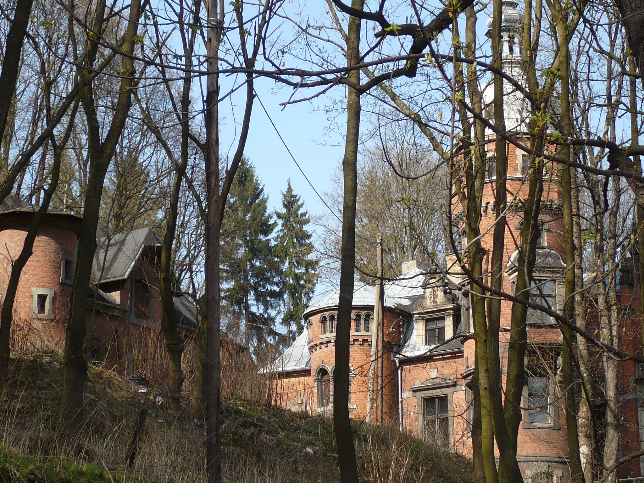 Nowa Ruda, ul. Piłsudskiego 20 - willa „Konrad”, 1890 (zabytek nr A/936/972/WŁ z 8.12.1983)